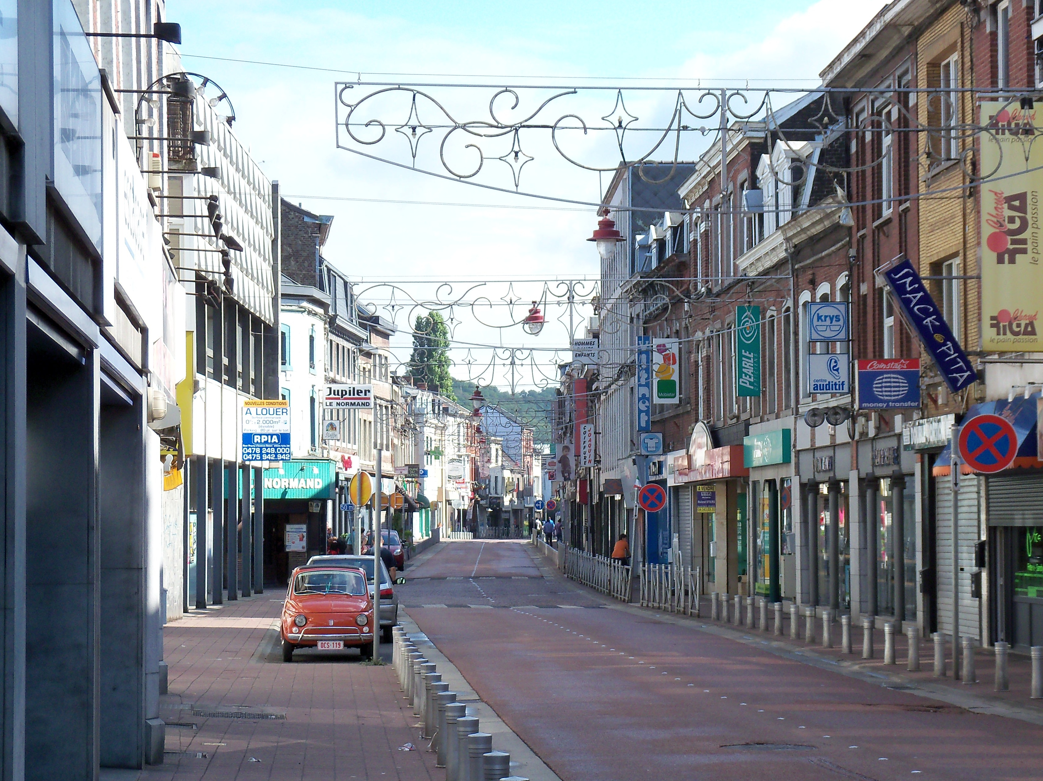 Emiliàn e rumagnòl: Jemeppe-sur-Meuse, Rue du pont